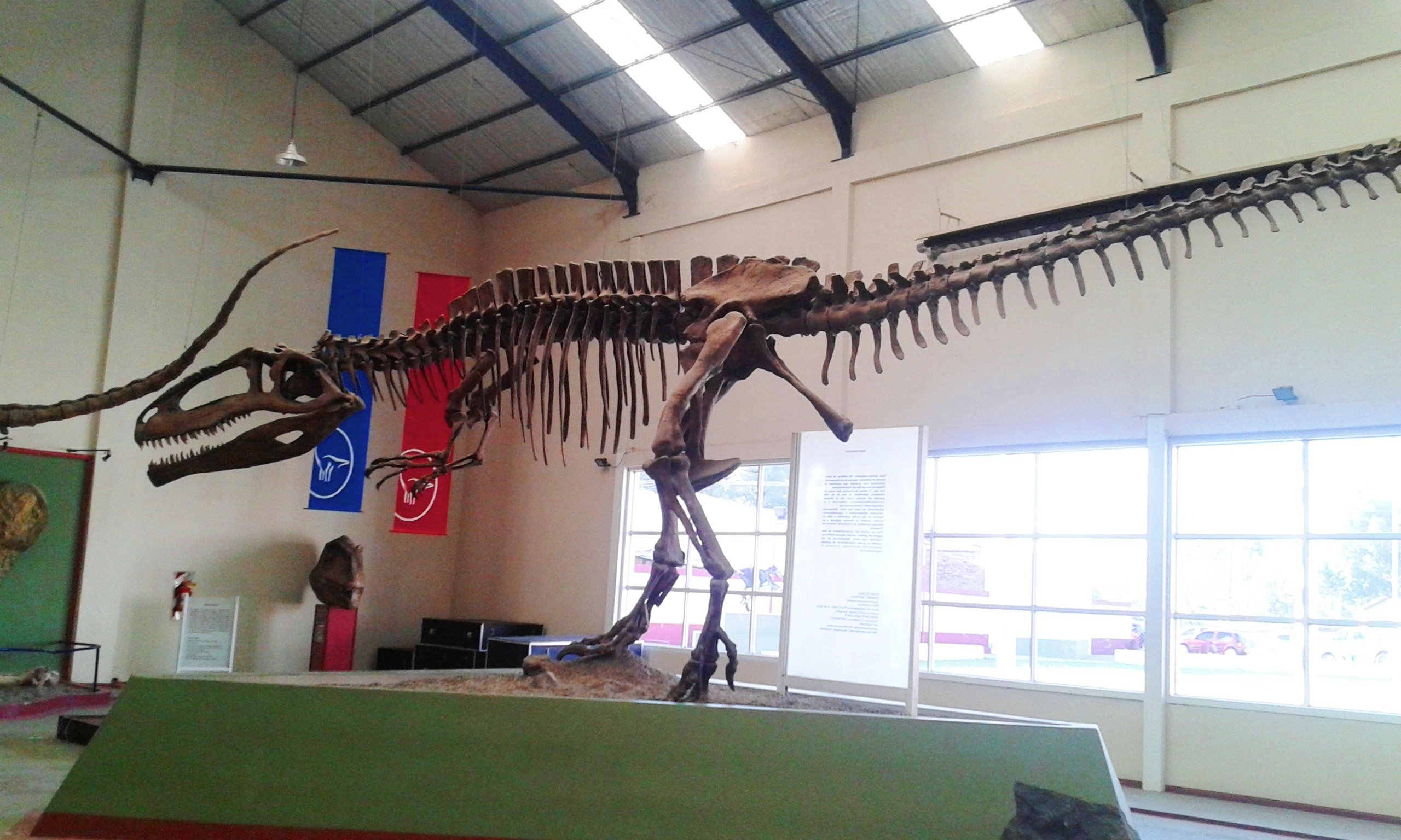 Réplica del esqueleto de Giganotosaurus carolinii en el Museo municipal Carmen Funes, de la provincia del Neuquén, Patagonia Argentina.